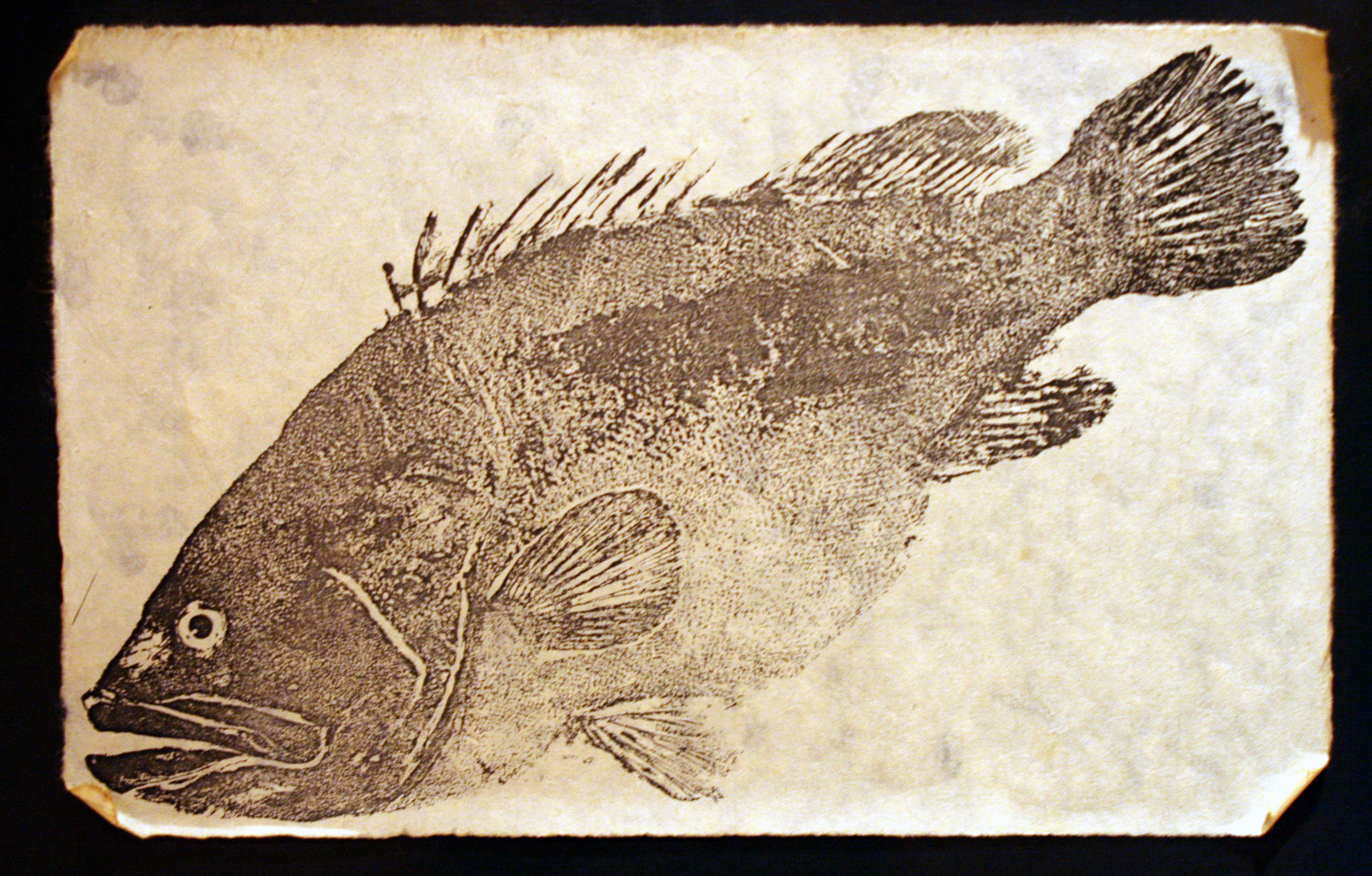 鱼拓